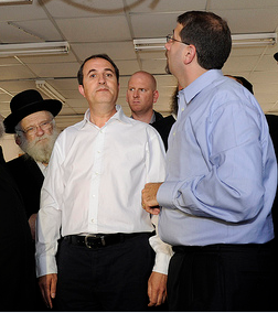 Посол США в Израиле Дан Шапиро и Д-р Йехиэль Ласри